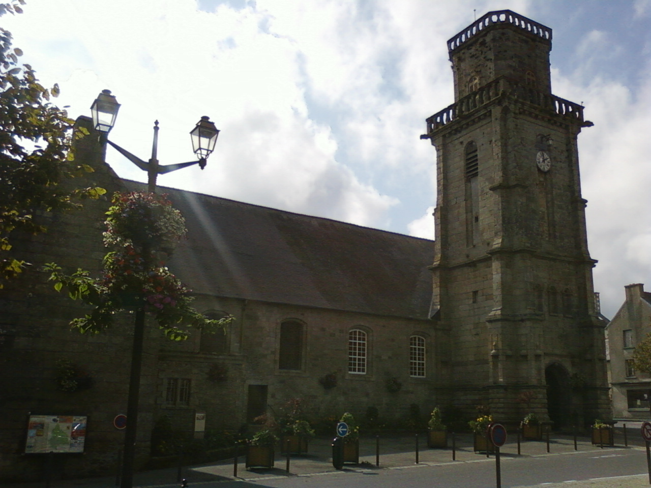 Eglise du XVIIIème siècle classée Monument Historique